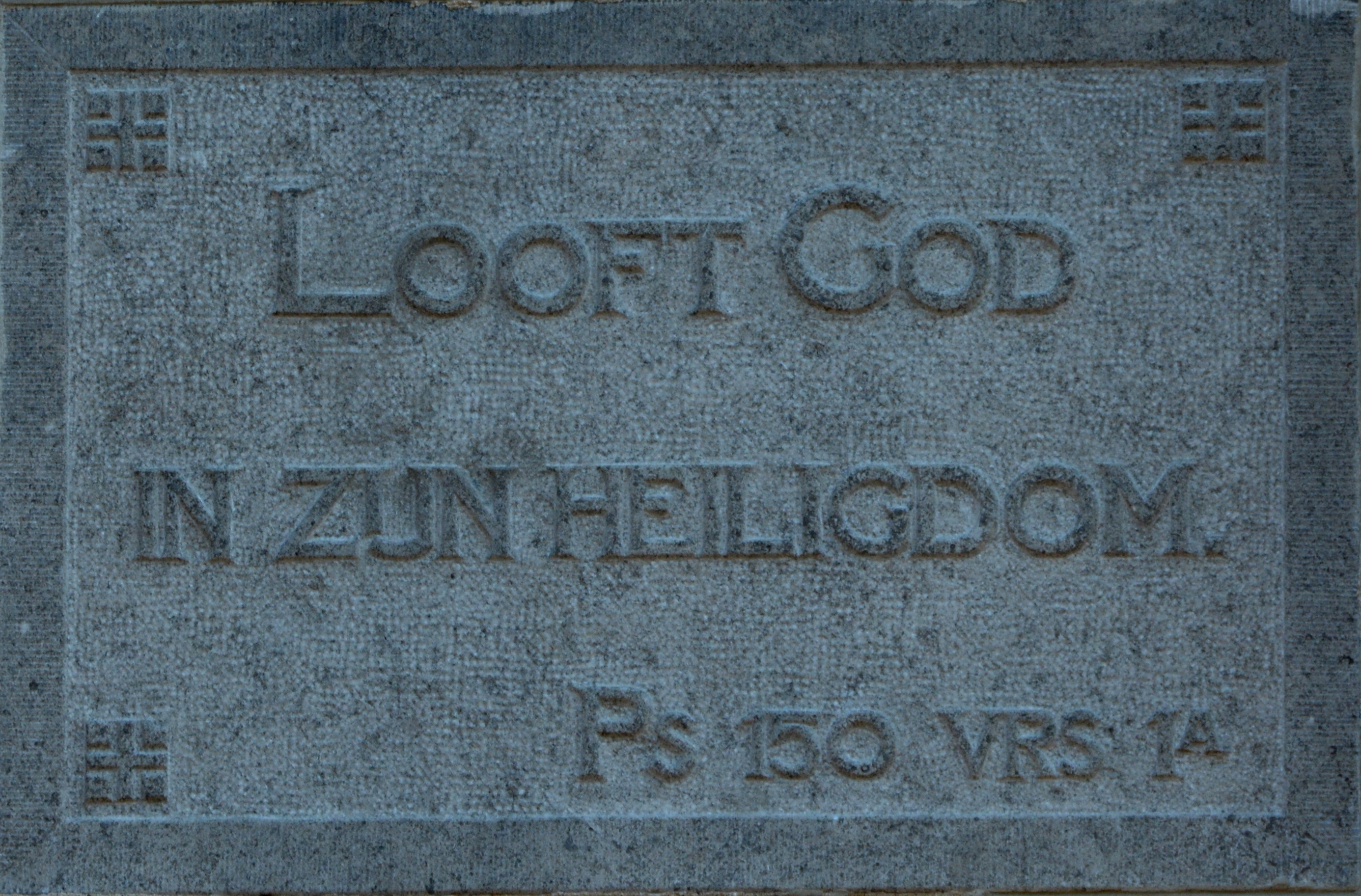 Donkerbroek, grifformearde tsjerke, gevelstien